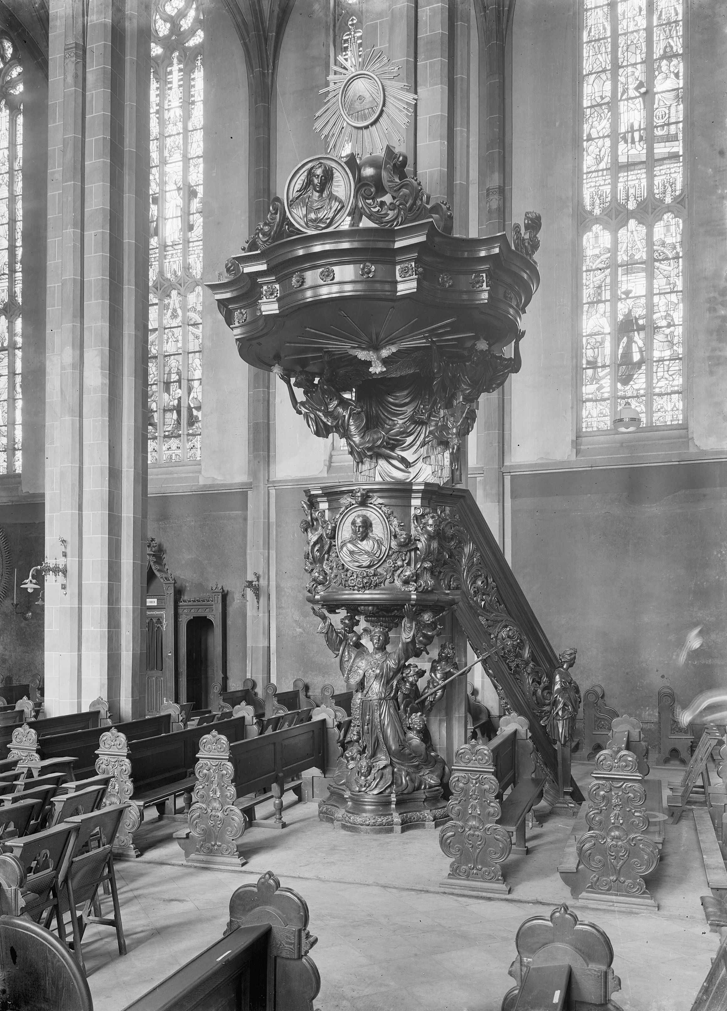 Sint Martinuskerk: Preekstoel